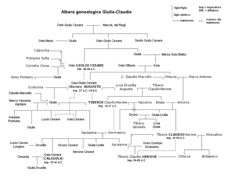 Albero genealogico Giulio-Claudio